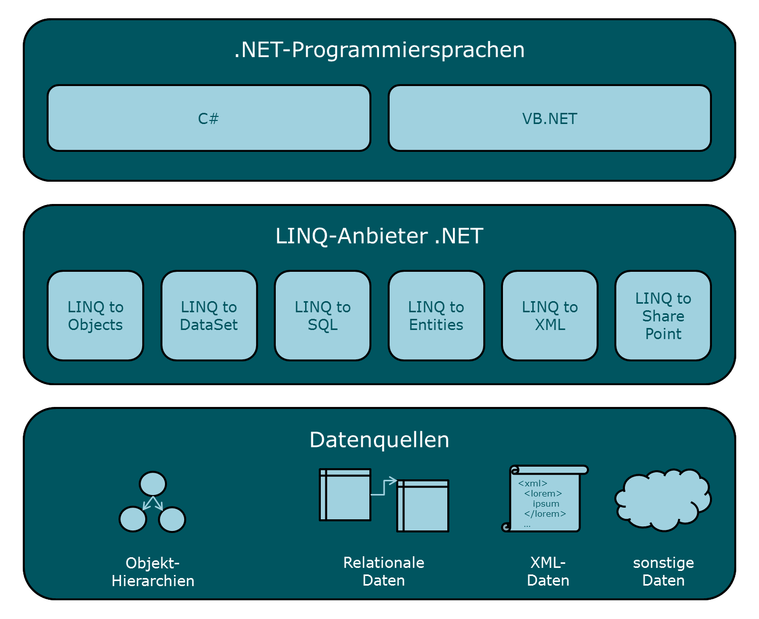 LINQ-Anbieter im .NET-Framework. In Anlehnung an Pialorsi, Microsoft SharePoint 2010 Entwicklerbuch, ISBN 978-3-86645-545-0.